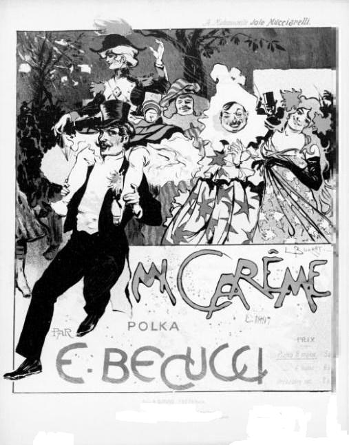 Illustration de Léonce Burret pour une partition de Ernesto Becucci.